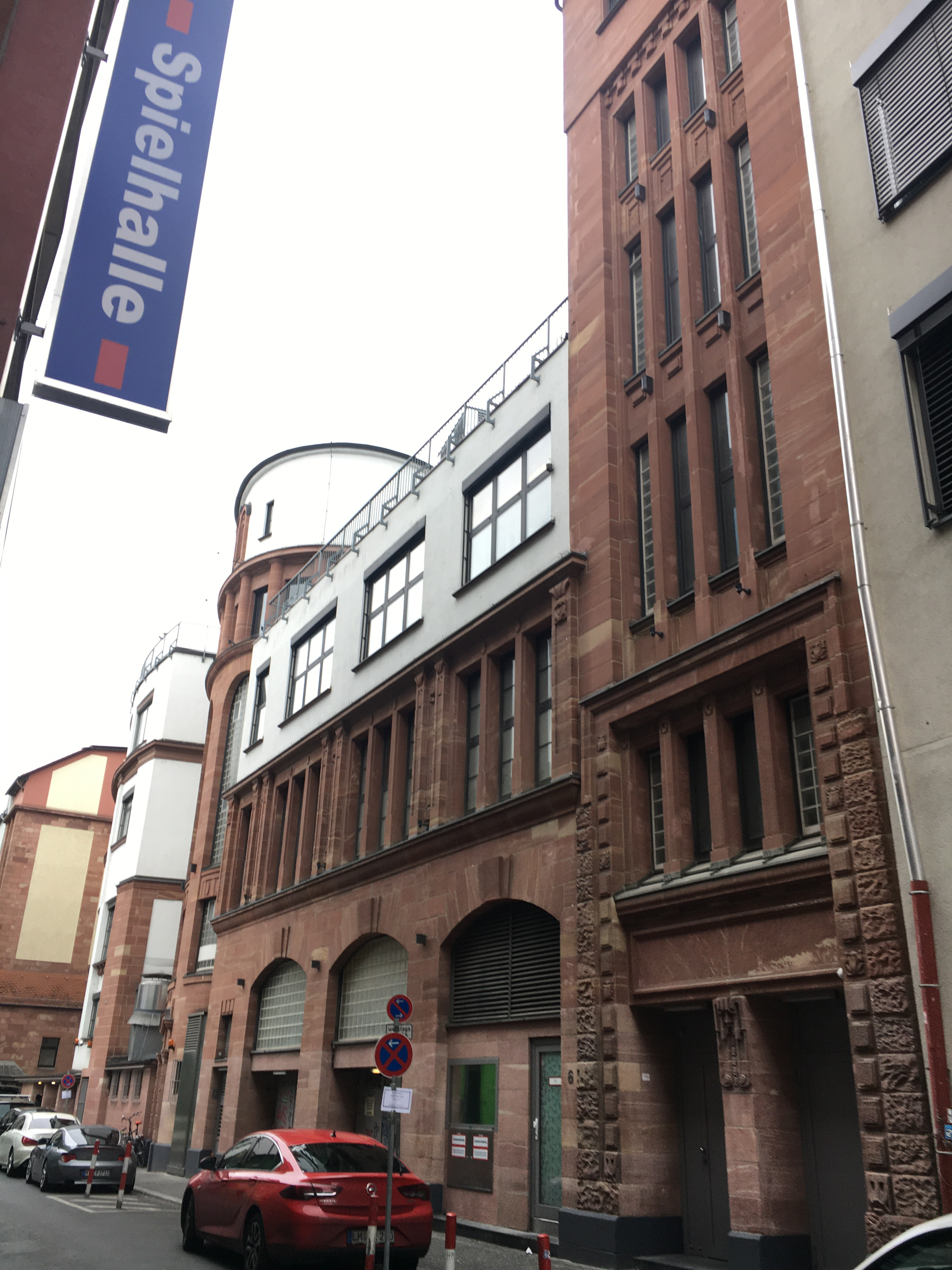 Holzgraben Frankfurt